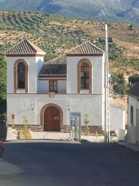 Ermita de los remedios en la calle Granada.